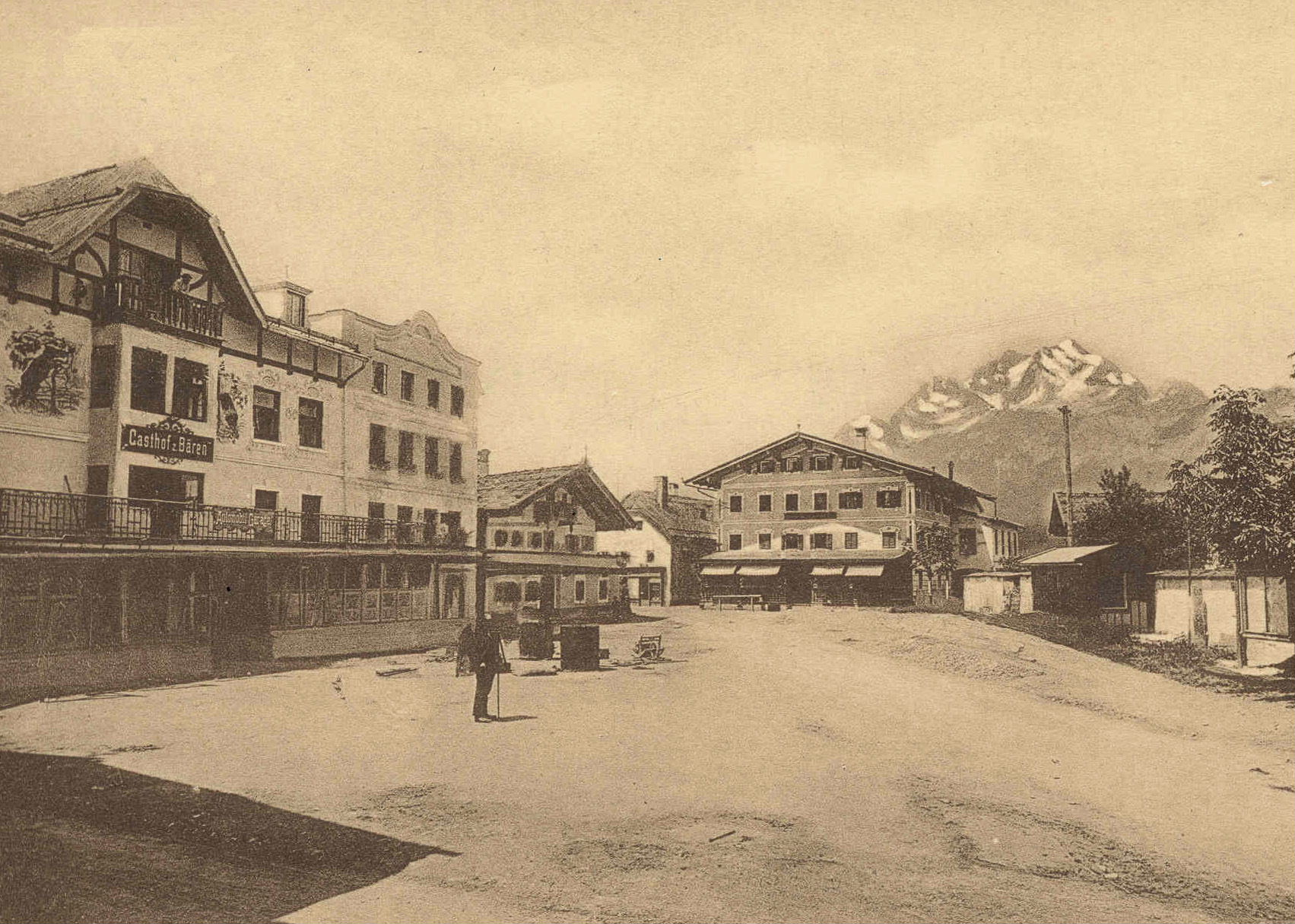 Hauptplatz St. Johann in Tirol um 1900